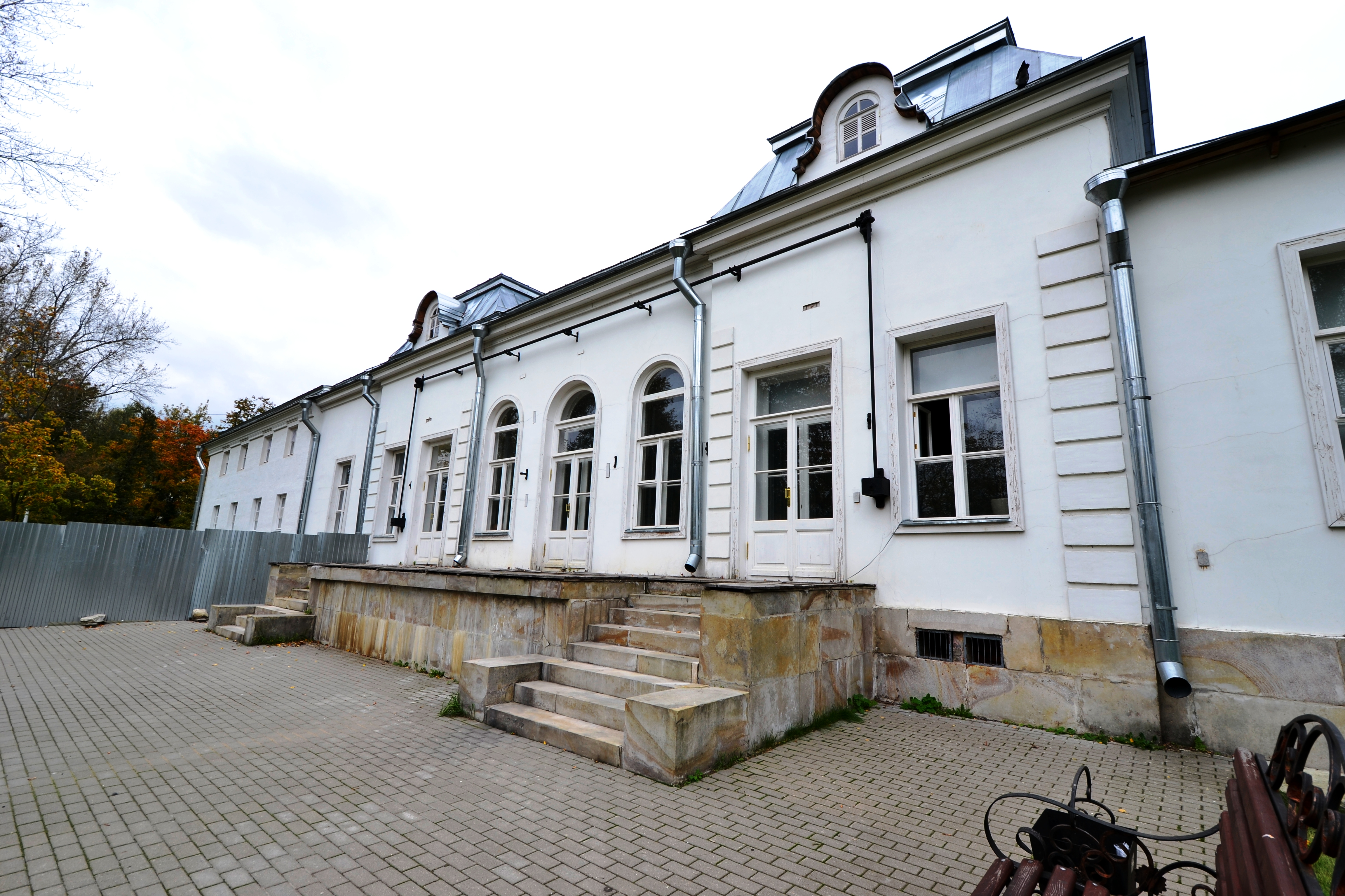 Усадьба Чернышёвой «Лыткарино»: квартал №7, 6; улица Коммунистическая, 10, Лыткарино, Московская область